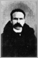 Italian sculptor Raffaello Pagliaccetti, XIX century